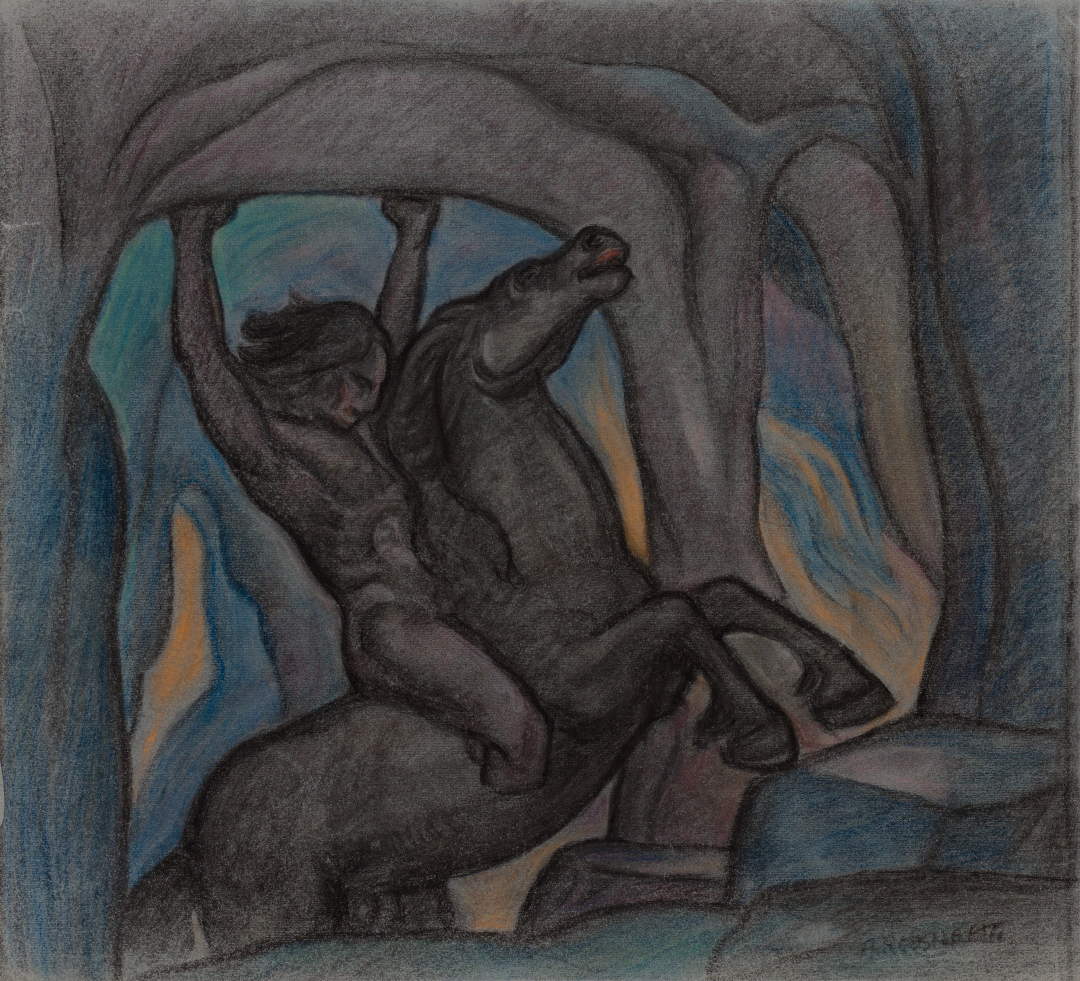 "Kalevipoeg Põrgu väravas"